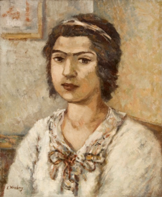 Tableau Jeune Fille en blanc, de Léon Weissberg